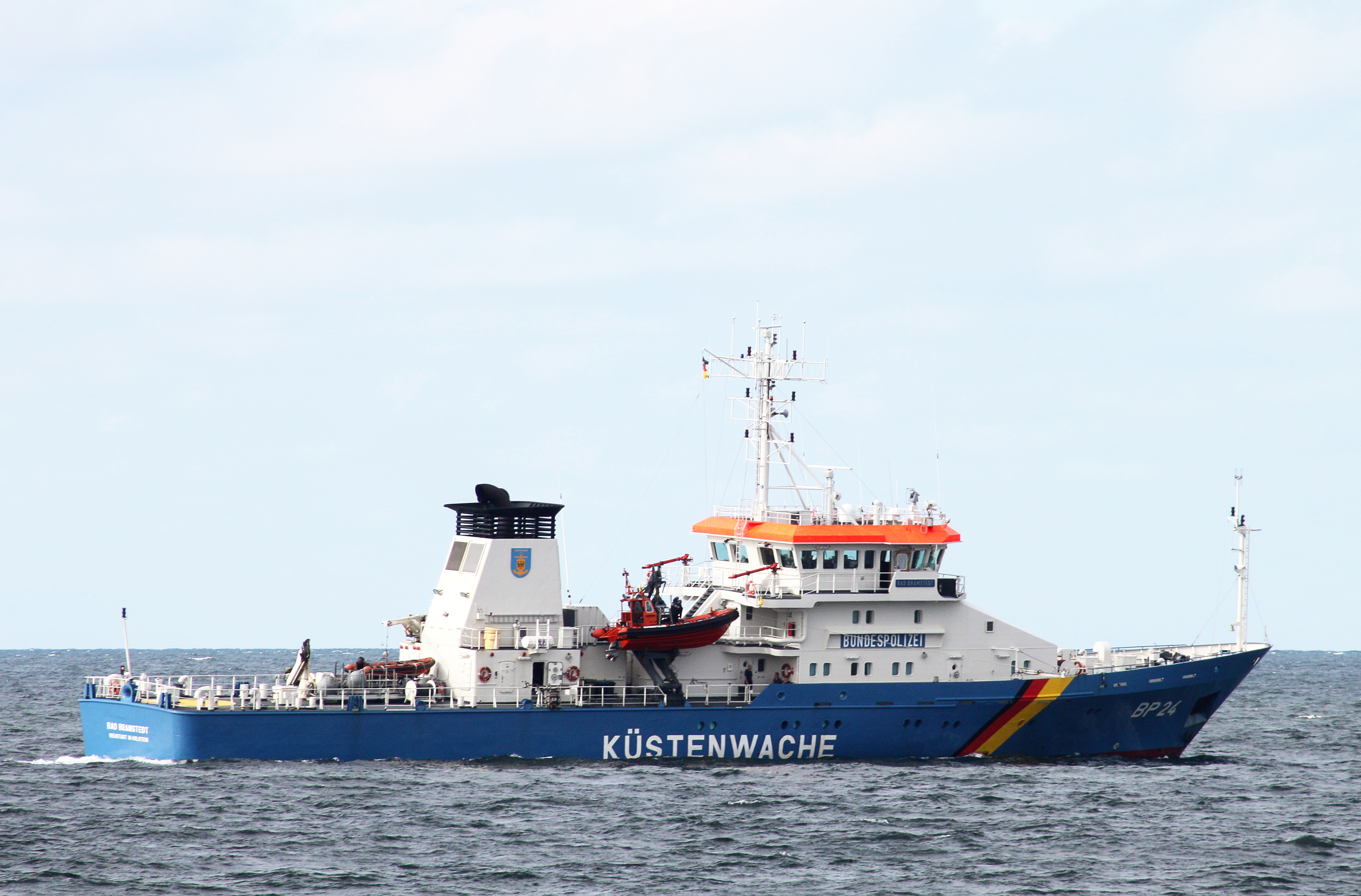 Helgoland